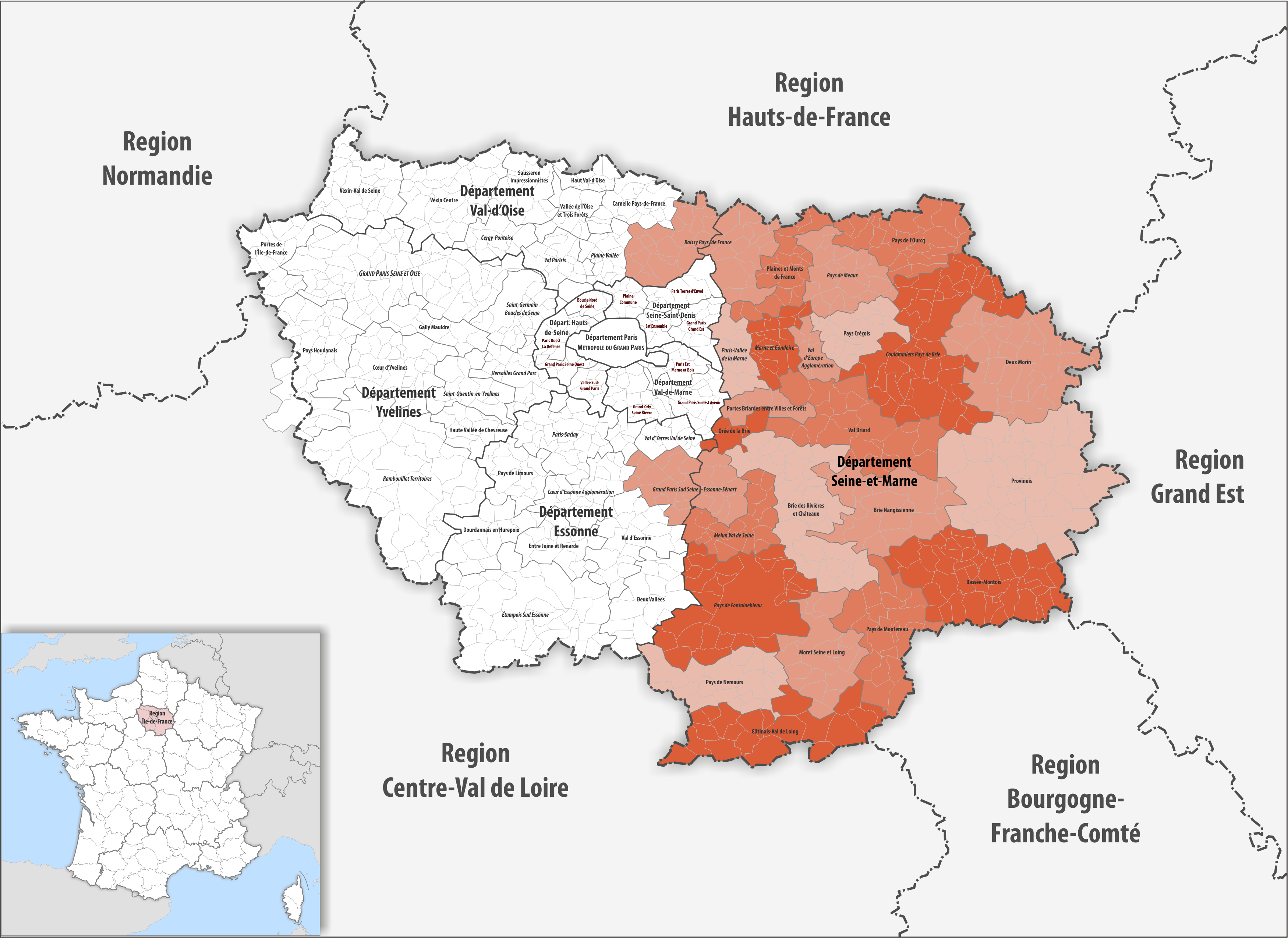 Gemeindeverbände im Département Seine-et-Marne